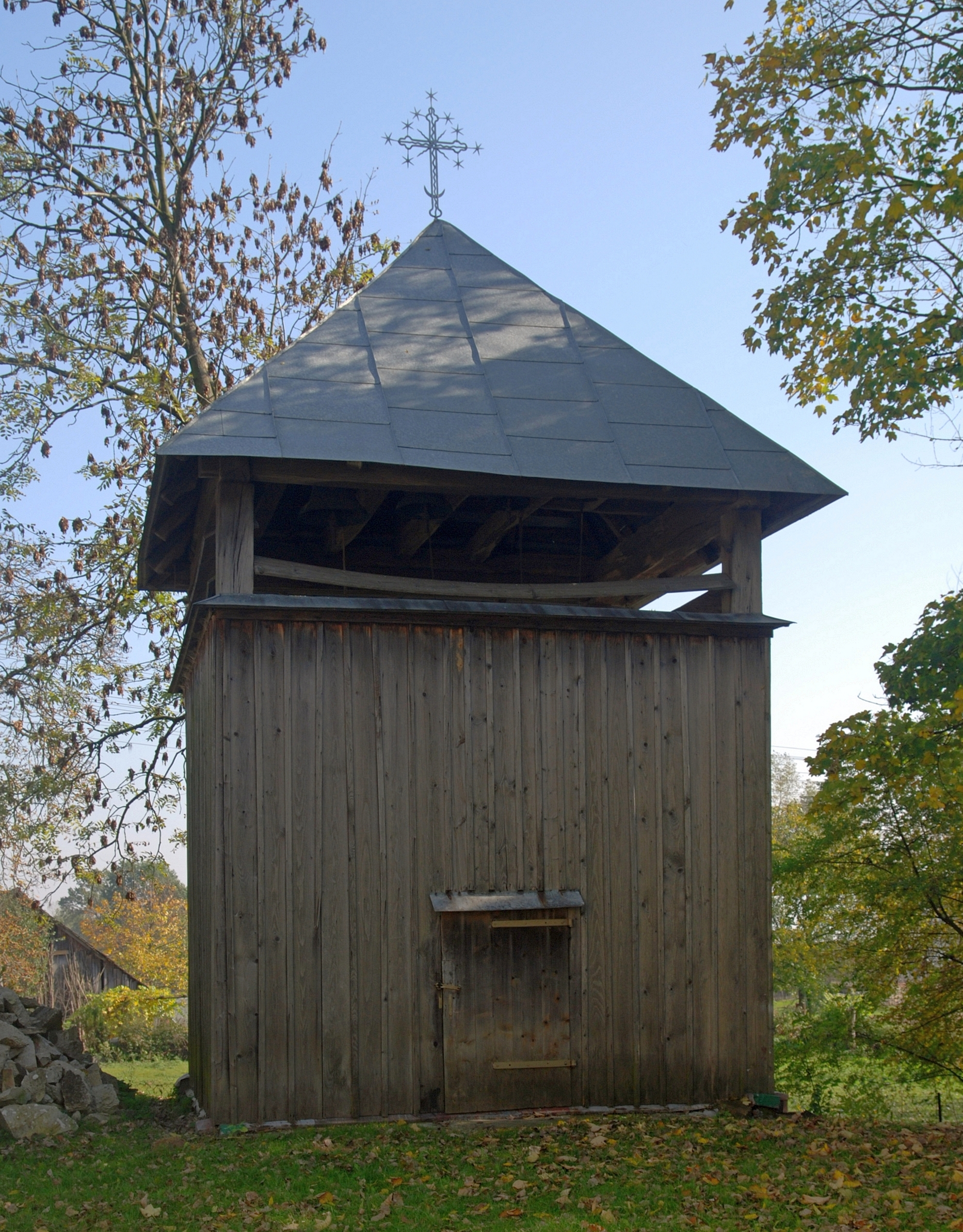 wieś Kalników